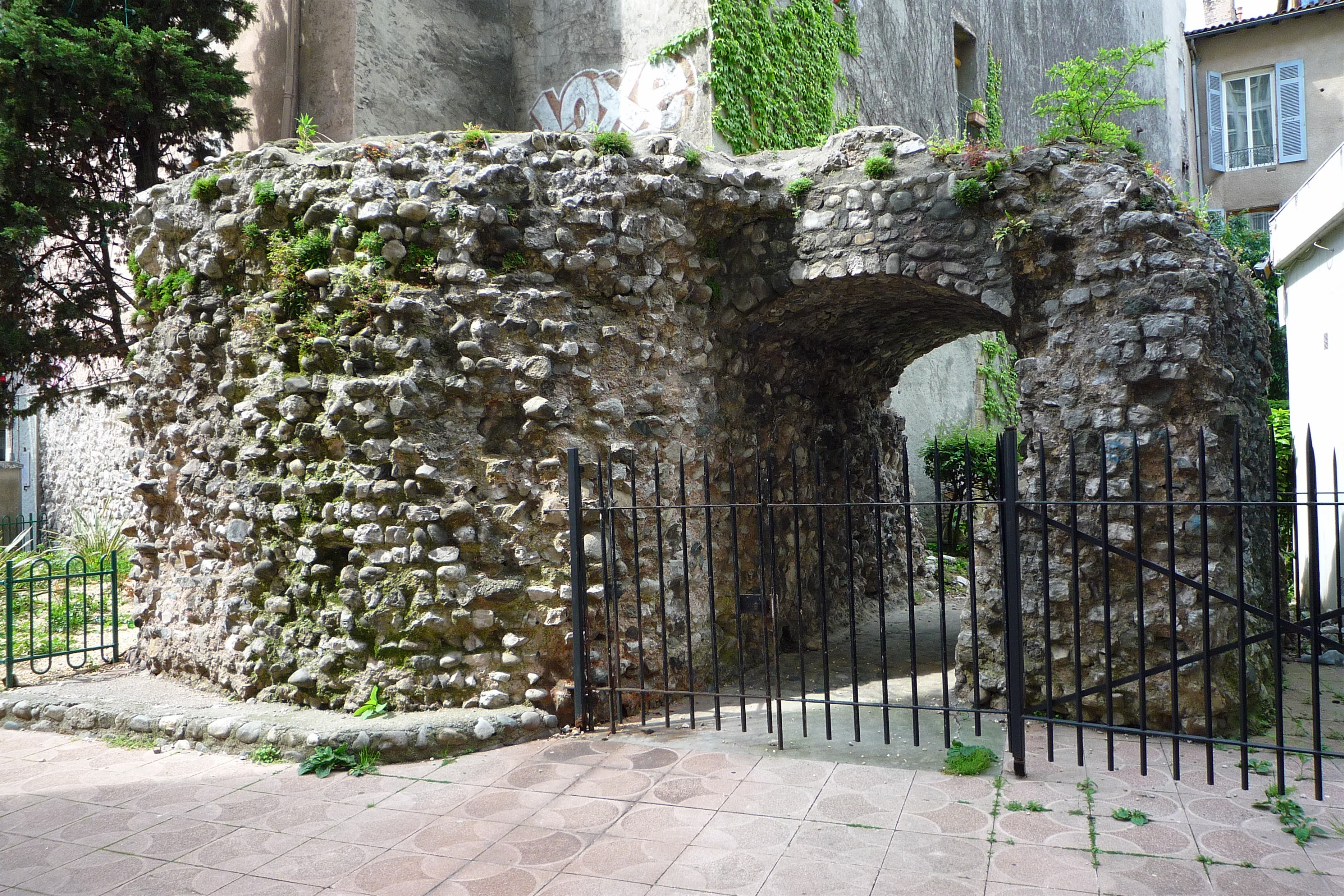 Unique vestiges de l'enceinte romaine du IIIe siècle de Cularo (Grenoble).